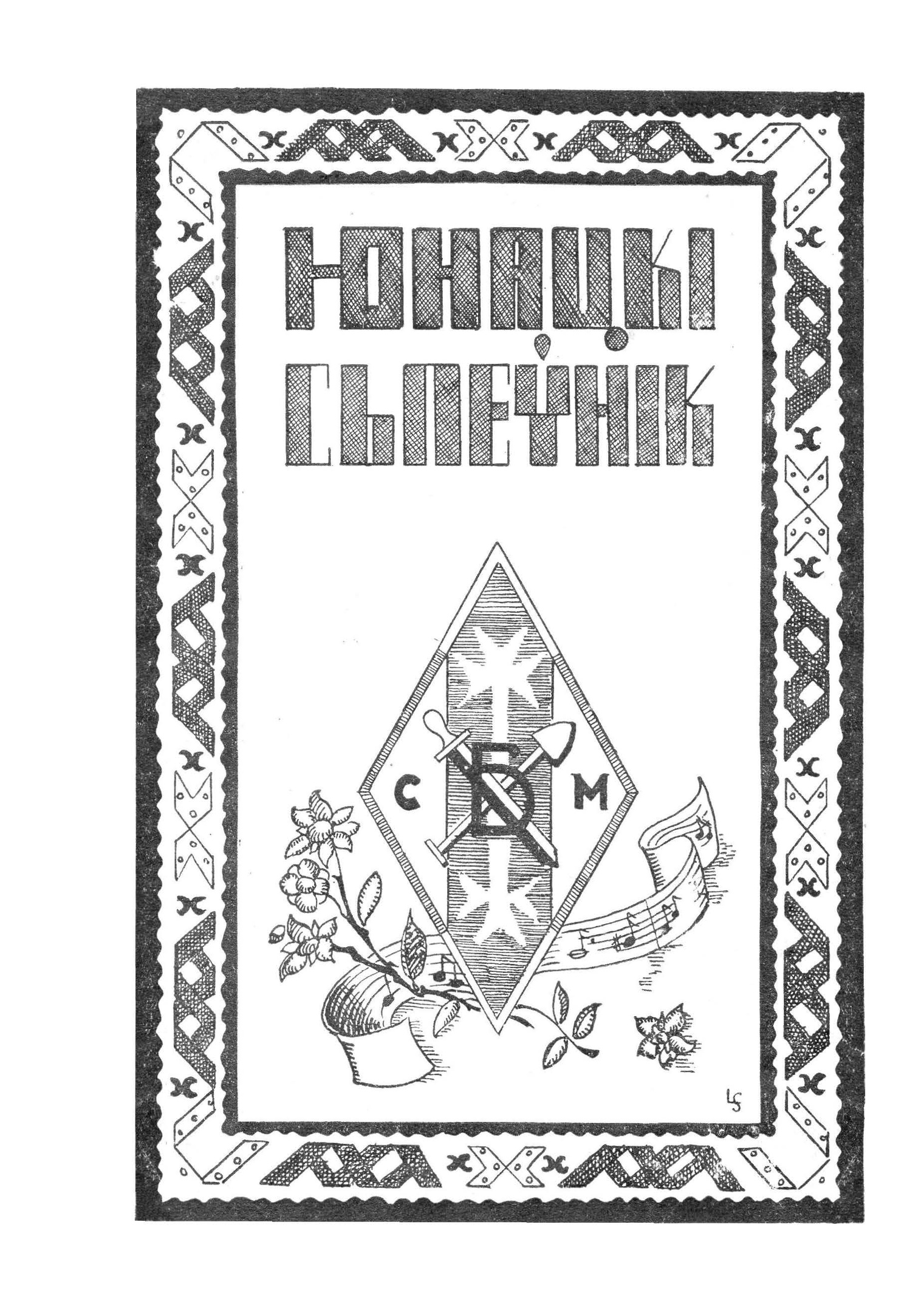 Вокладка «Юнацкага сьпеўніка» СБМ